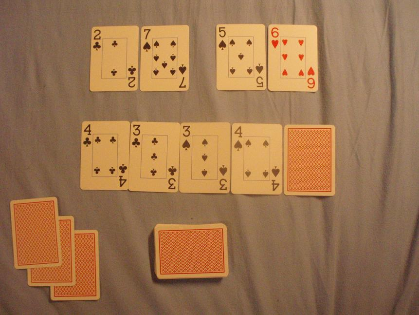 situs poker online Indonesia Terpercaya Agen judi Uang Asli Domino Qiu Qiu Resmi Dengan sistem progressive jackpot idnpoker .